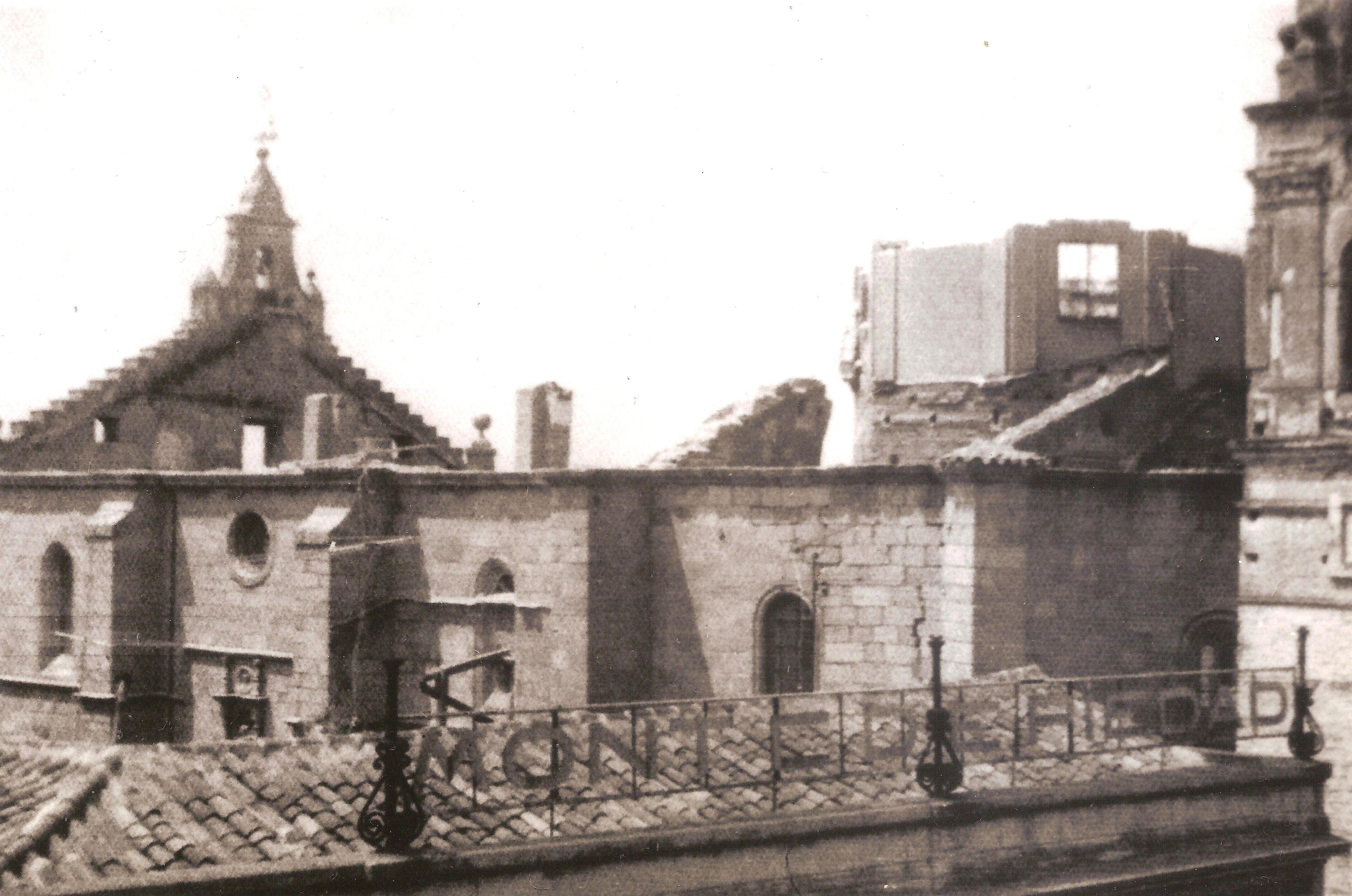 Aspecto de la Iglesia de San Miguel tras el incendio que la asoló en la noche entre el 7 y 8 de junio de 1971.